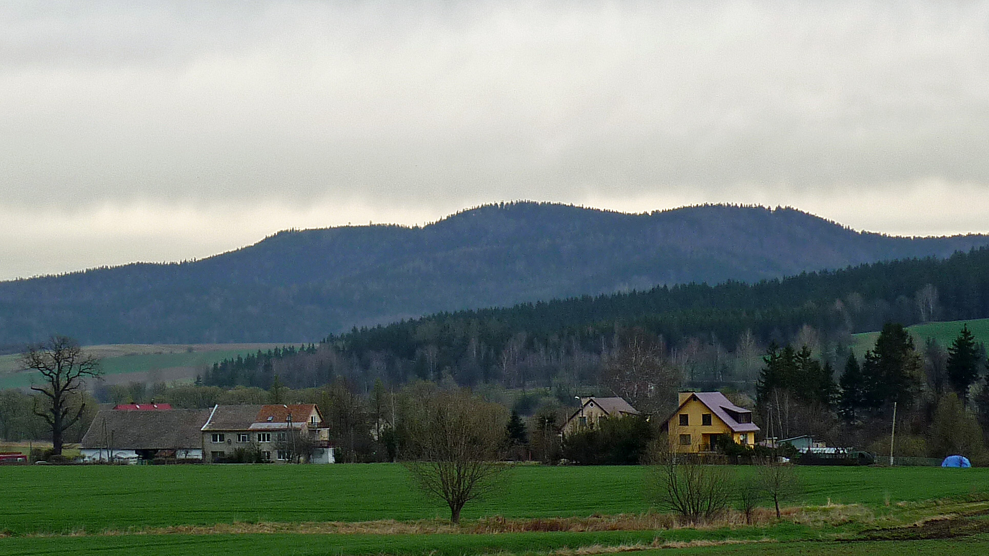 Trójgarb w Górach Wałbrzyskich